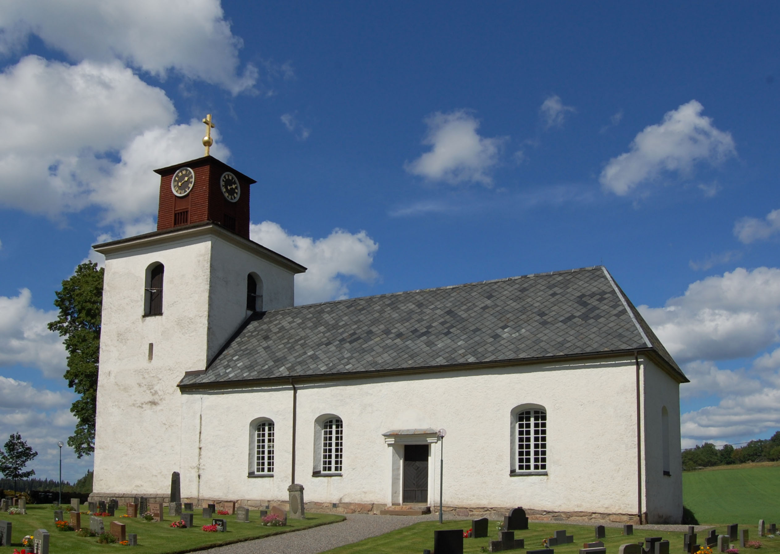 Skepperstad kyrka